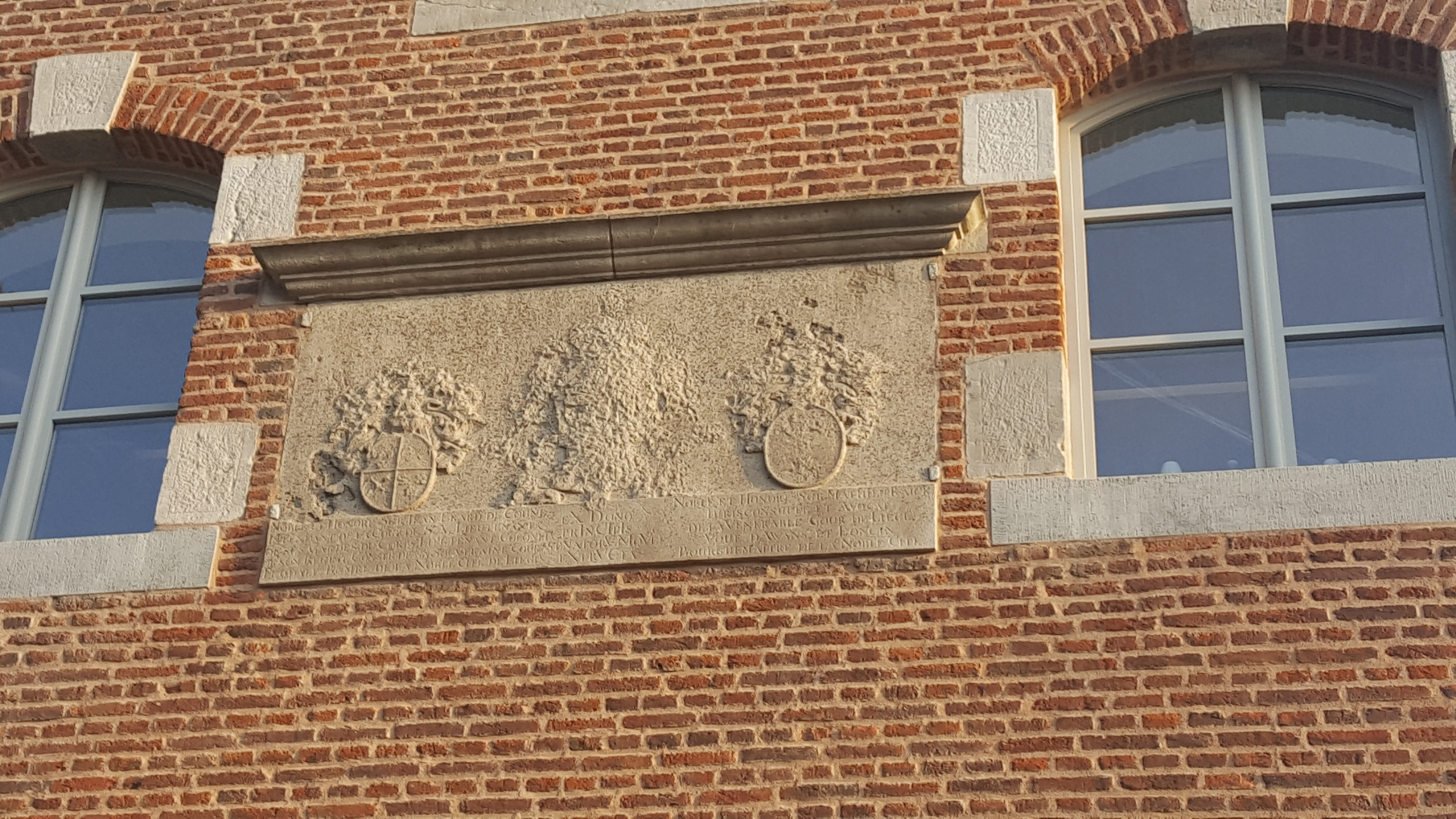 Ancienne brasserie, Liège, Belgique